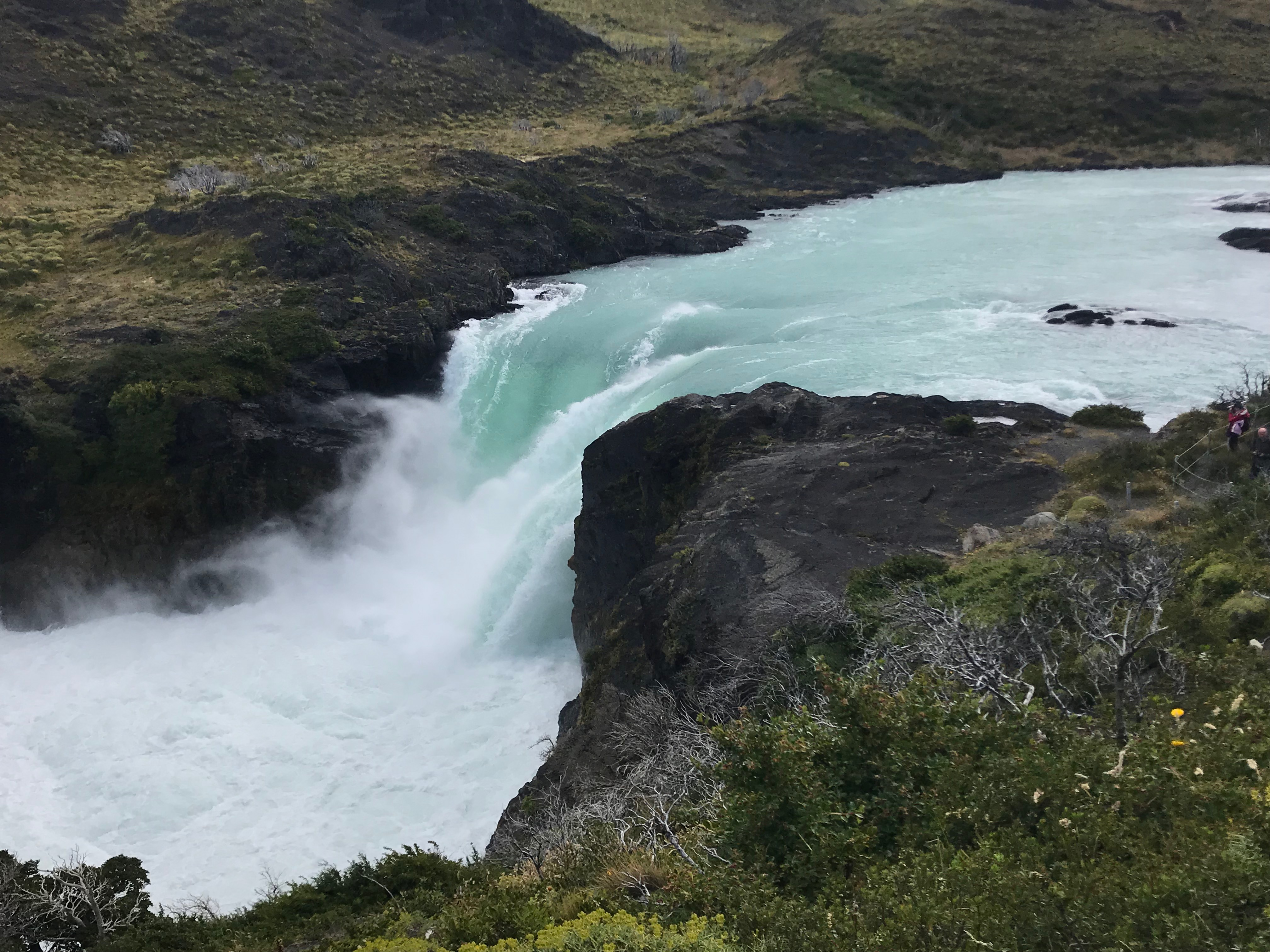 Parque Nacional Torres del Paine